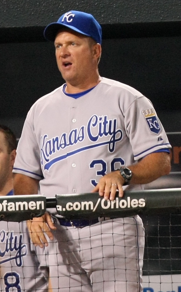 Kevin Seitzer